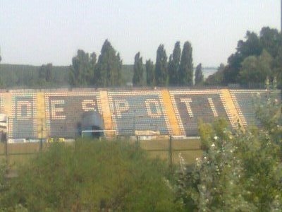 Severna tribina stadiona u Smederevu Licensing